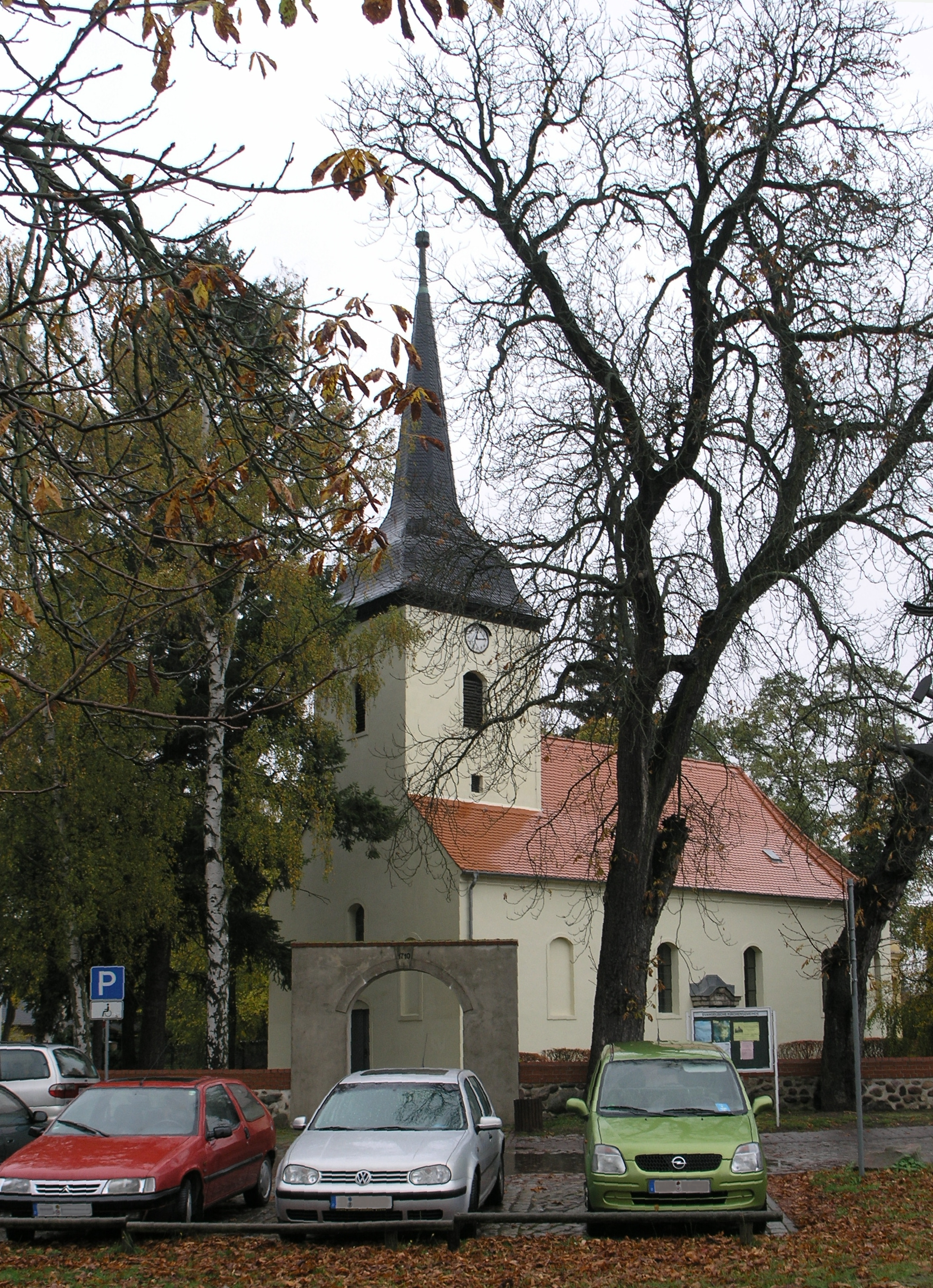 ev. Dorfkirche in Fredersdorf, Ernst-Thälmann-Str.